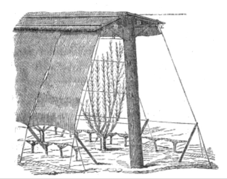 Konstruktion Leperesche Mauer